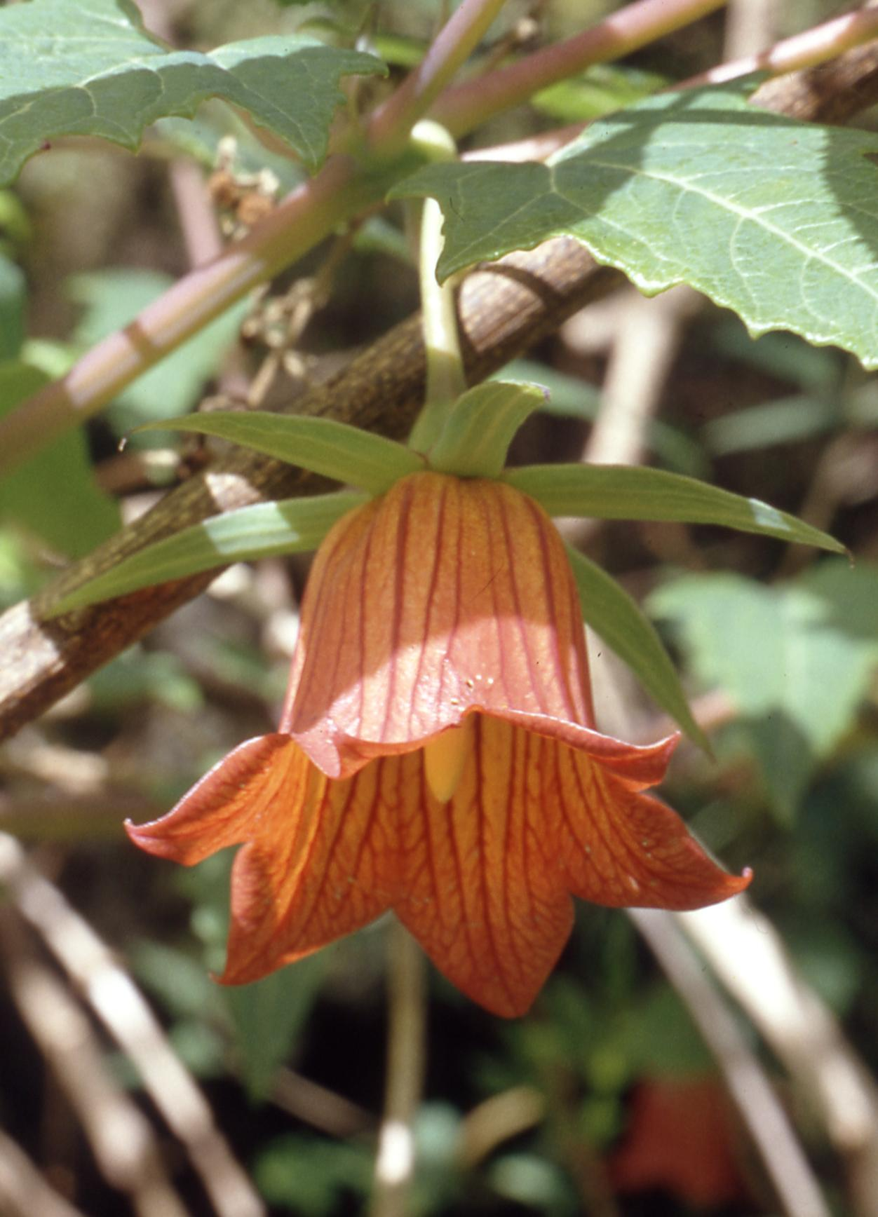 Blüte der Kanarischen Glockenblume in einem Botanischen Garten auf Gran Canaria.